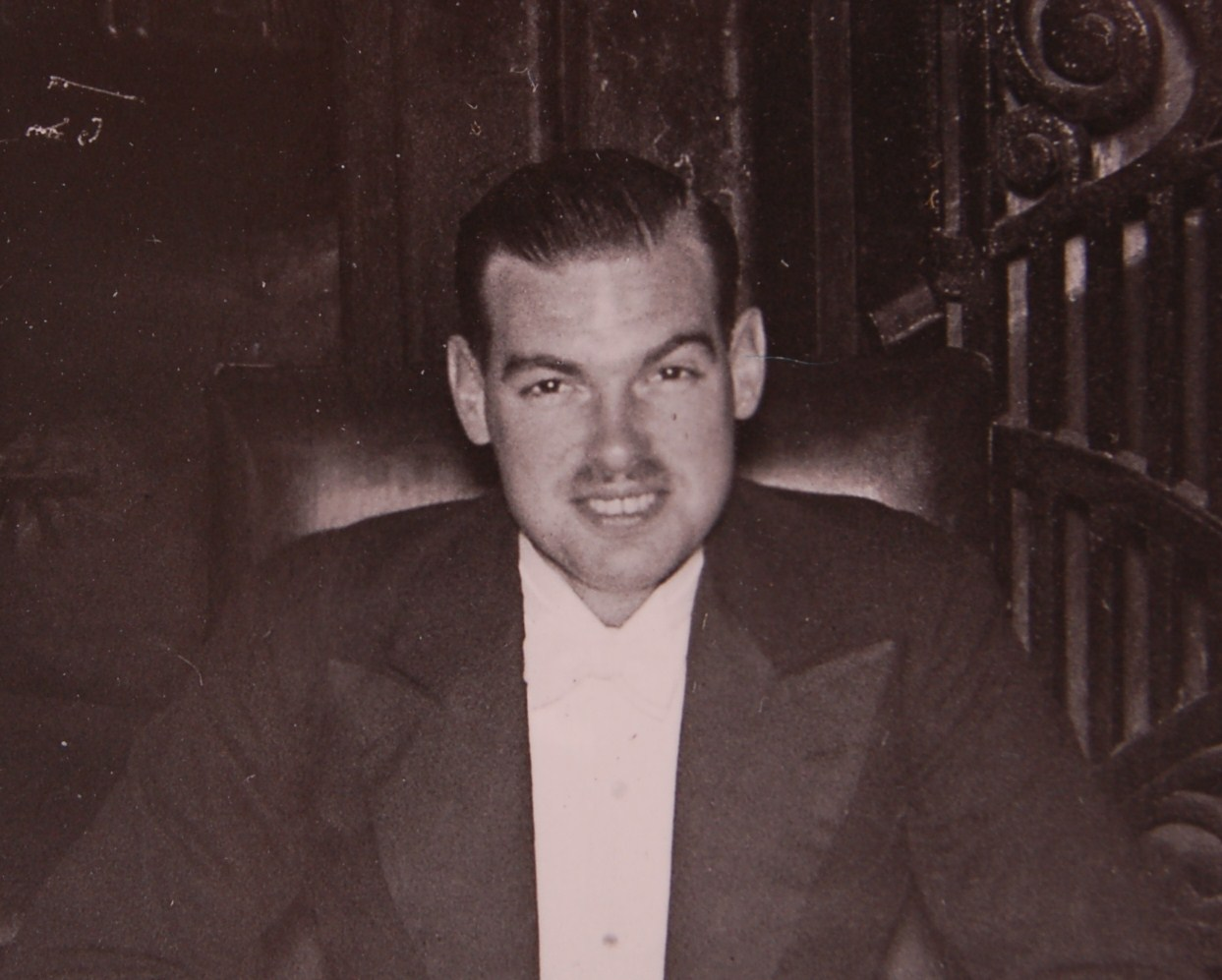 Ernst de Jonge, praeses collegii